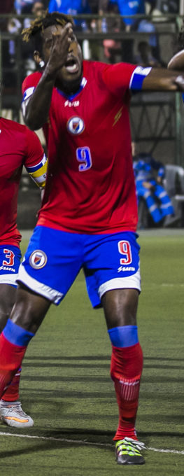 Nicaragua vs Haití repechaje para Copa de oro de la CONCACAF. Marzo 2017. Victoria de Nicaragua